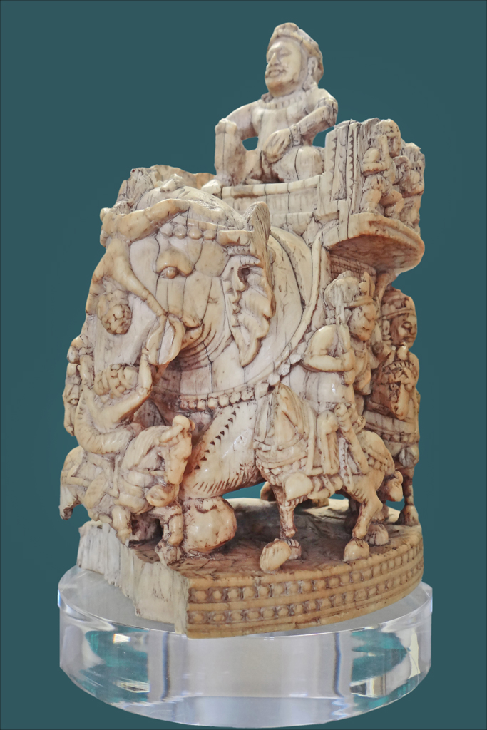 Pièce d'échec (?), éléphant dit "de Charlemagne" Ivoire d'éléphant Inde IXè ou Xè siècle Trésor de l'abbaye de saint-Denis, Inv.55.311 Inscription koufique soue le pied "Oeuvre de Yusuf Al Bahili" Département des Monnaies, médailles et antiques Bibliothèque nationale de France site officiel